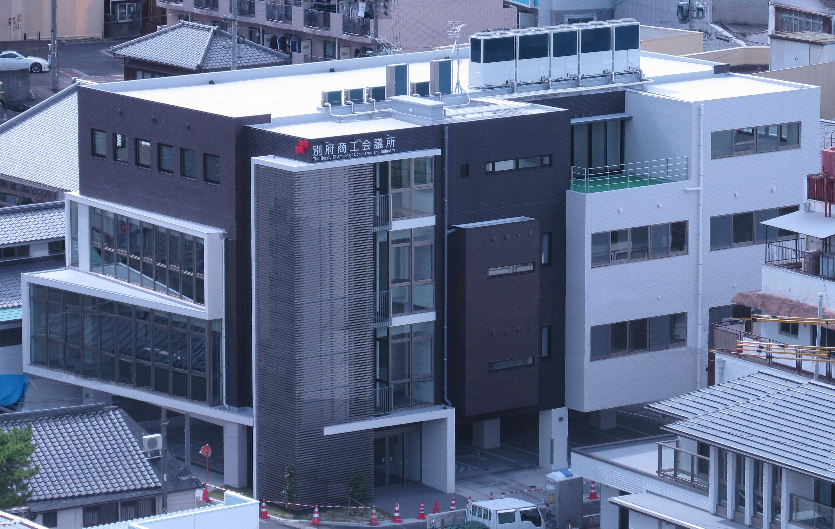 別府商工会館